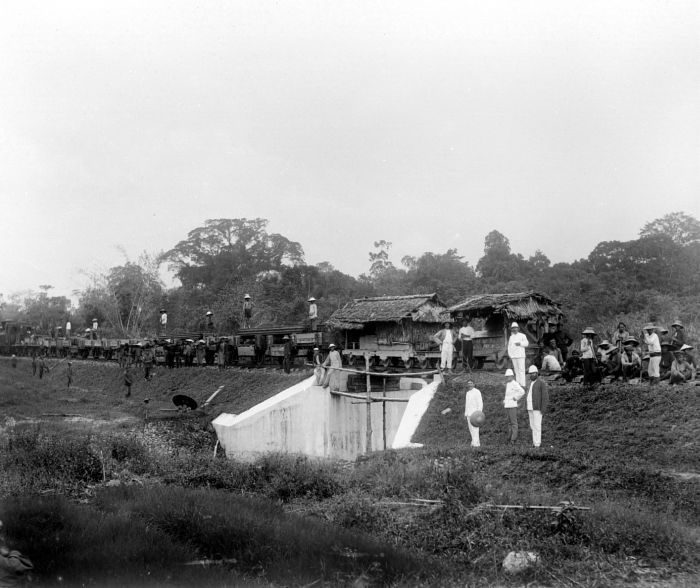 Negatief. Het spoor is voor een groot gedeelte angelegd en een trein met spoorwerkers rijdt er over heen. Op de voorgrond een aantal opzichters in witte pakken, even rustend bij een spoor brug.. Aanleg van de spoorlijn Padang-Kajoetanam aan Sumatra's westkust